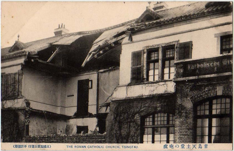 青岛圣言会会馆1914年损毁状况